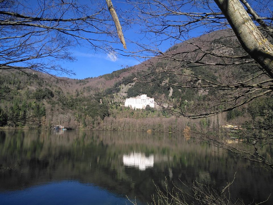 Il lago piccolo di Monticchio con l'Abbazia sullo sfondo This is a photo of a monument which is part of cultural heritage of Italy.